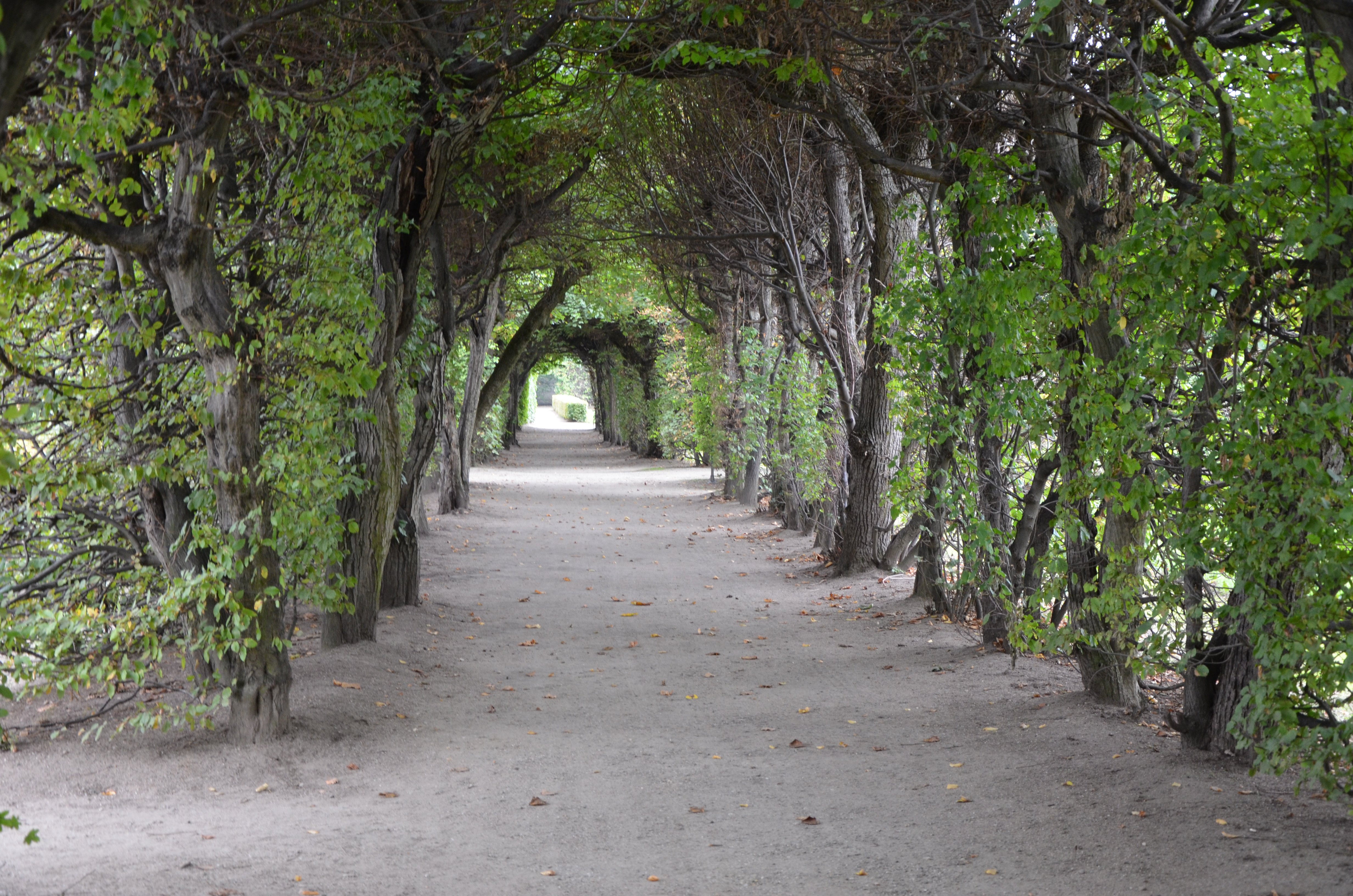 Berceaux w ogrodzie francuskim biskupiego pałacu w Kromeriz (Czechy)